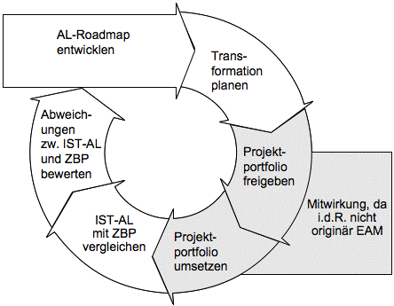 Idealer EAM Prozess